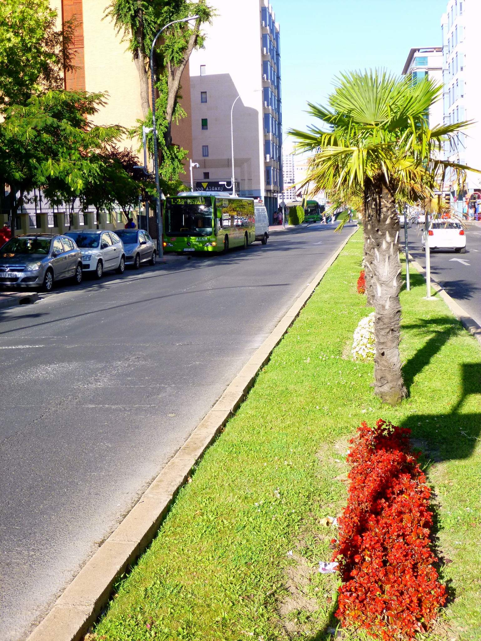 Torrejón de Ardoz.